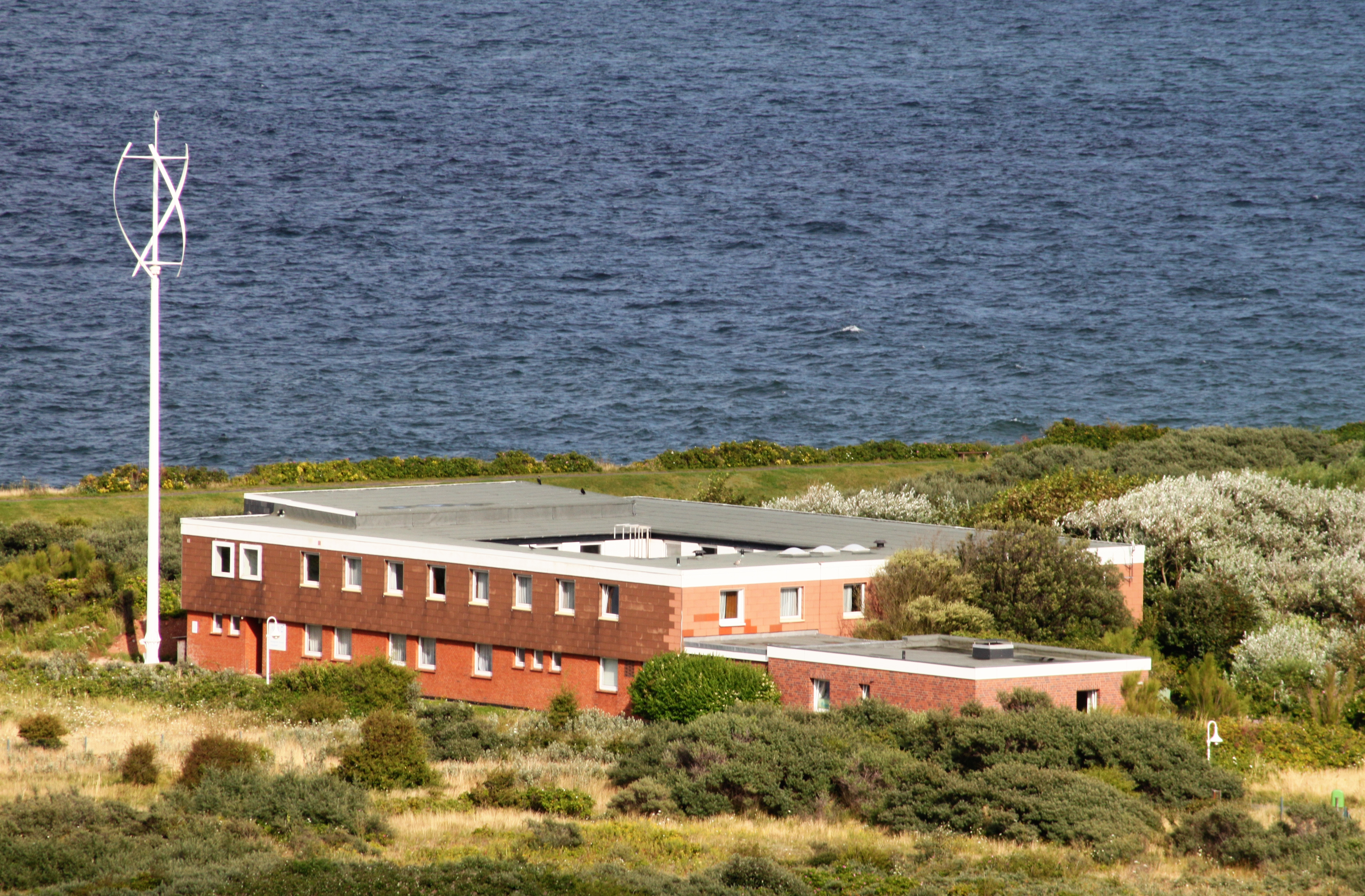 Helgoland, Wilhelm-Mielck-Haus (Gästehaus AWI) mit der Mikrowindturbine „qr5“ (2011 in Betrieb genommen, Mast ca. 15 m, Turbinenflügeldurchmesser ca. 3 m)